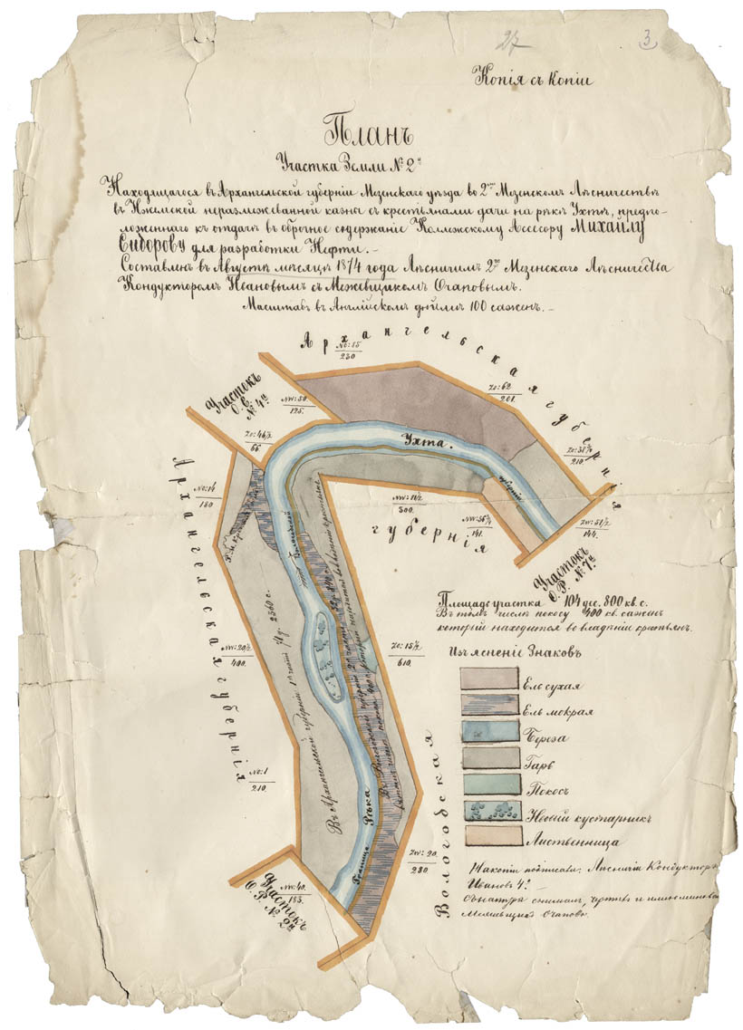 План участка М.К. Сидорова. Ухтинский историко-краеведческий музей